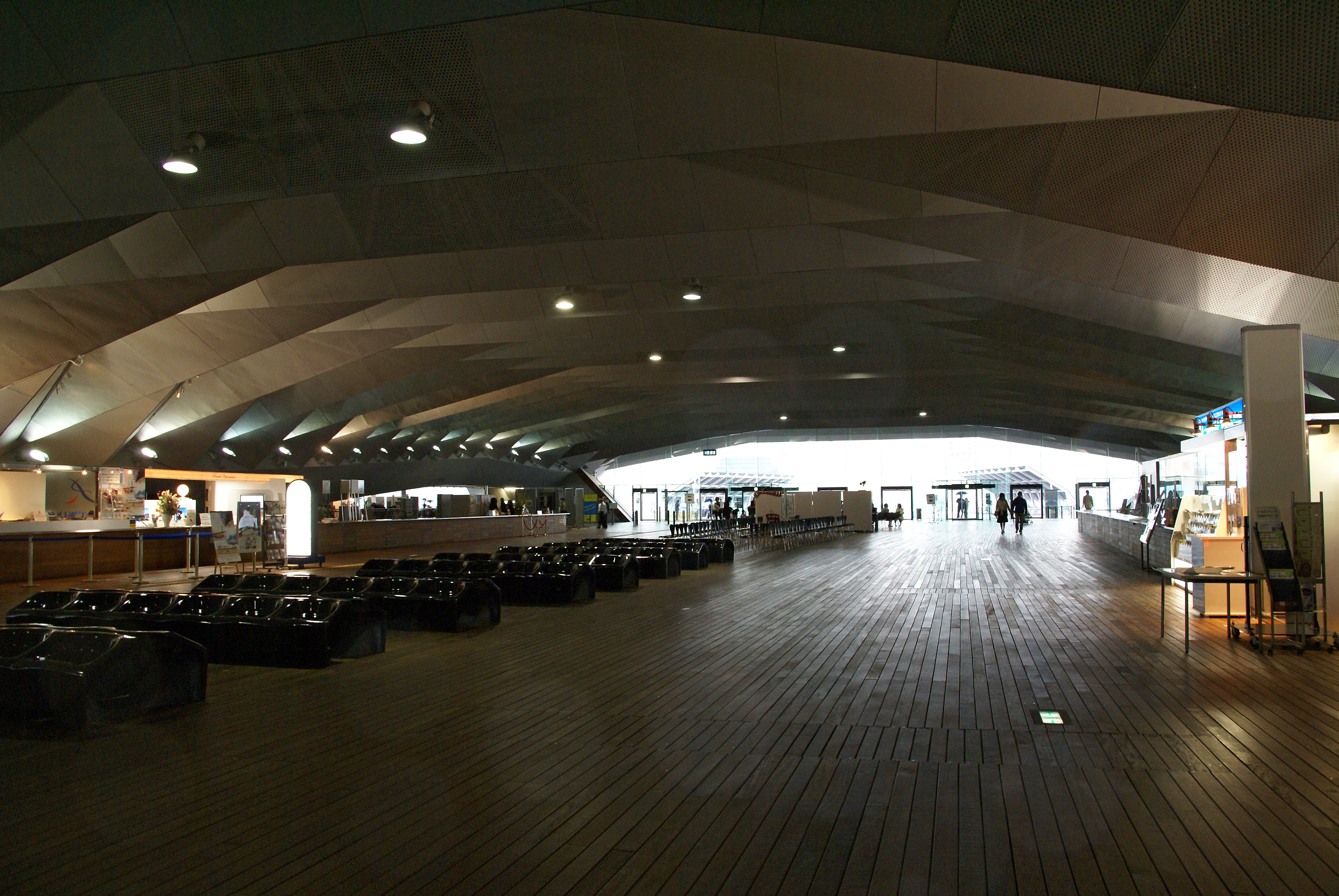 Osanbashi Pier in Yokohama, Japan